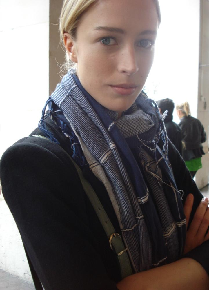 Model Raquel Zimmermann depicted person: Raquel Zimmermann (age: 23.81)